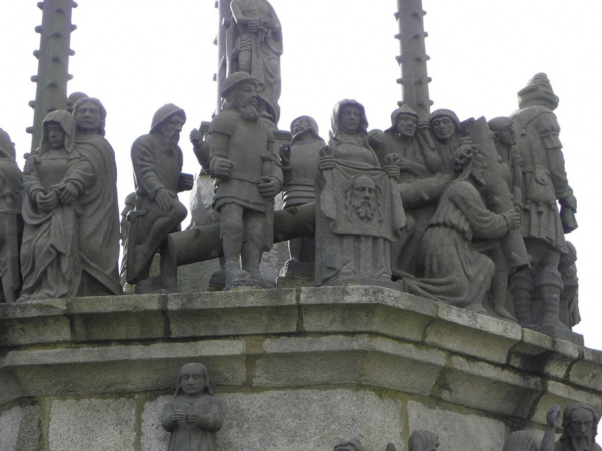 Portement de Croix. Détail du calvaire de Plougonven (29). .